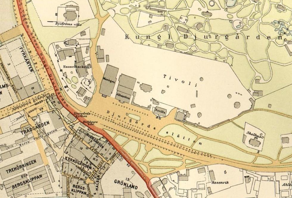 1899 års karta över Stockholm, del av Södra Djurgården